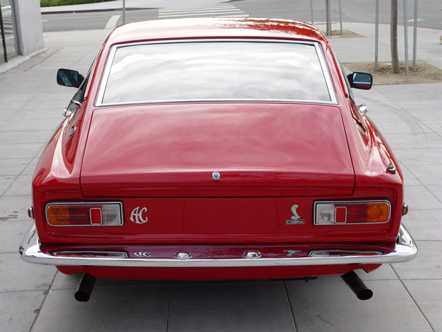 1968 AC Frua coupe